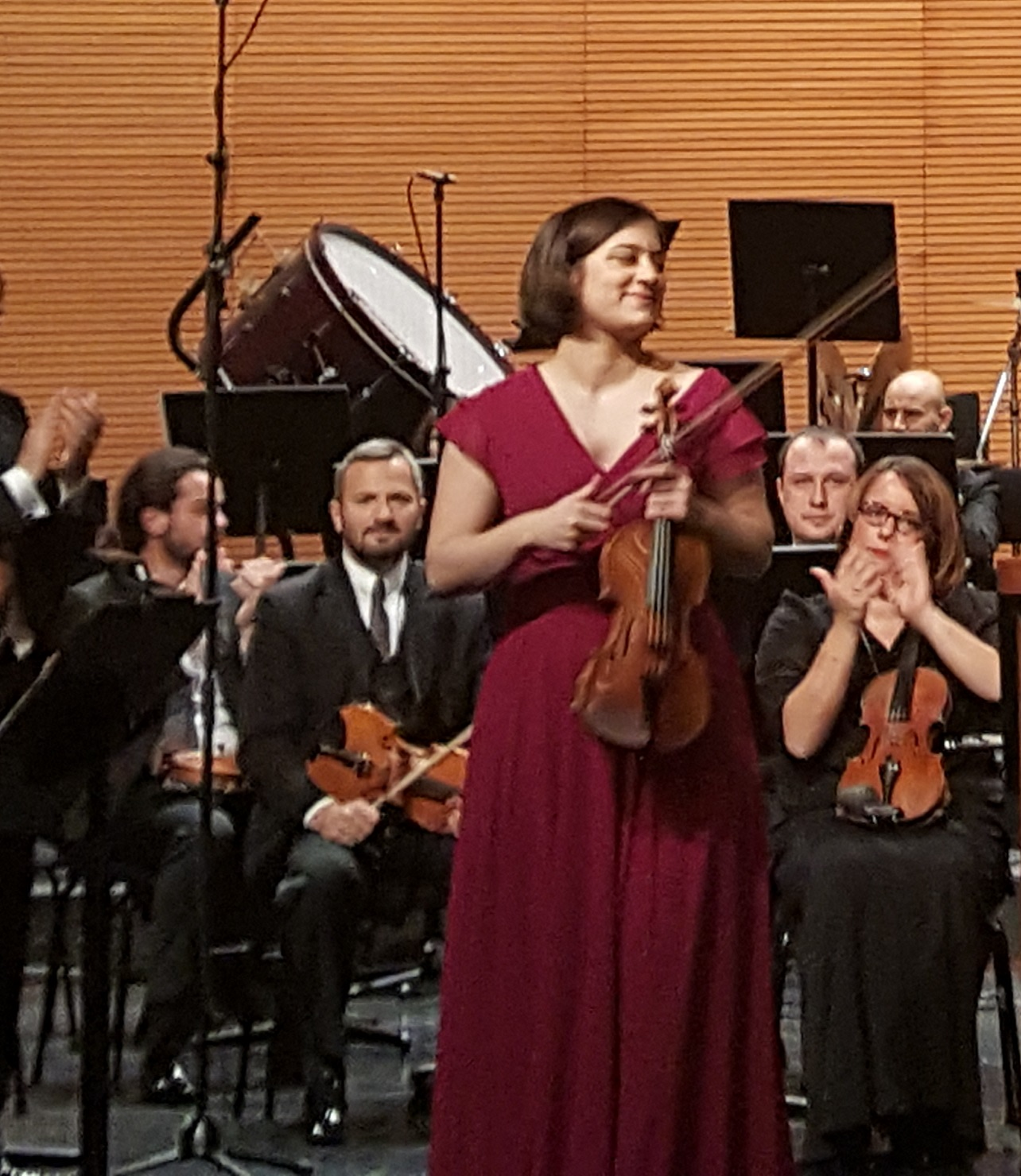 Veriko Tchumburidze, Aralık 2016, Bursa